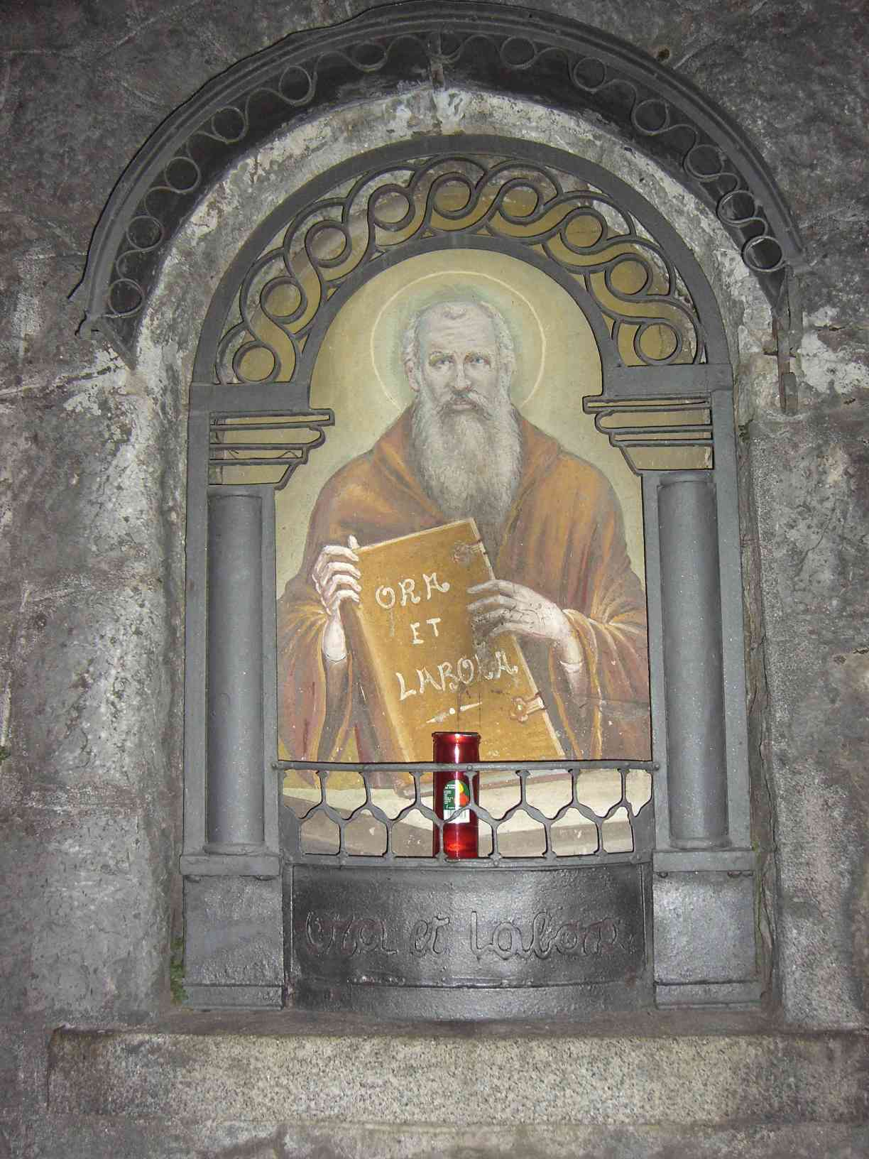 BS Bienno ORA ET LABORA